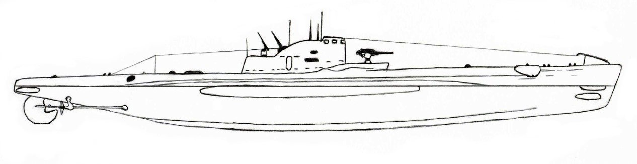 Подводная лодка типа «Пизани», Италия.